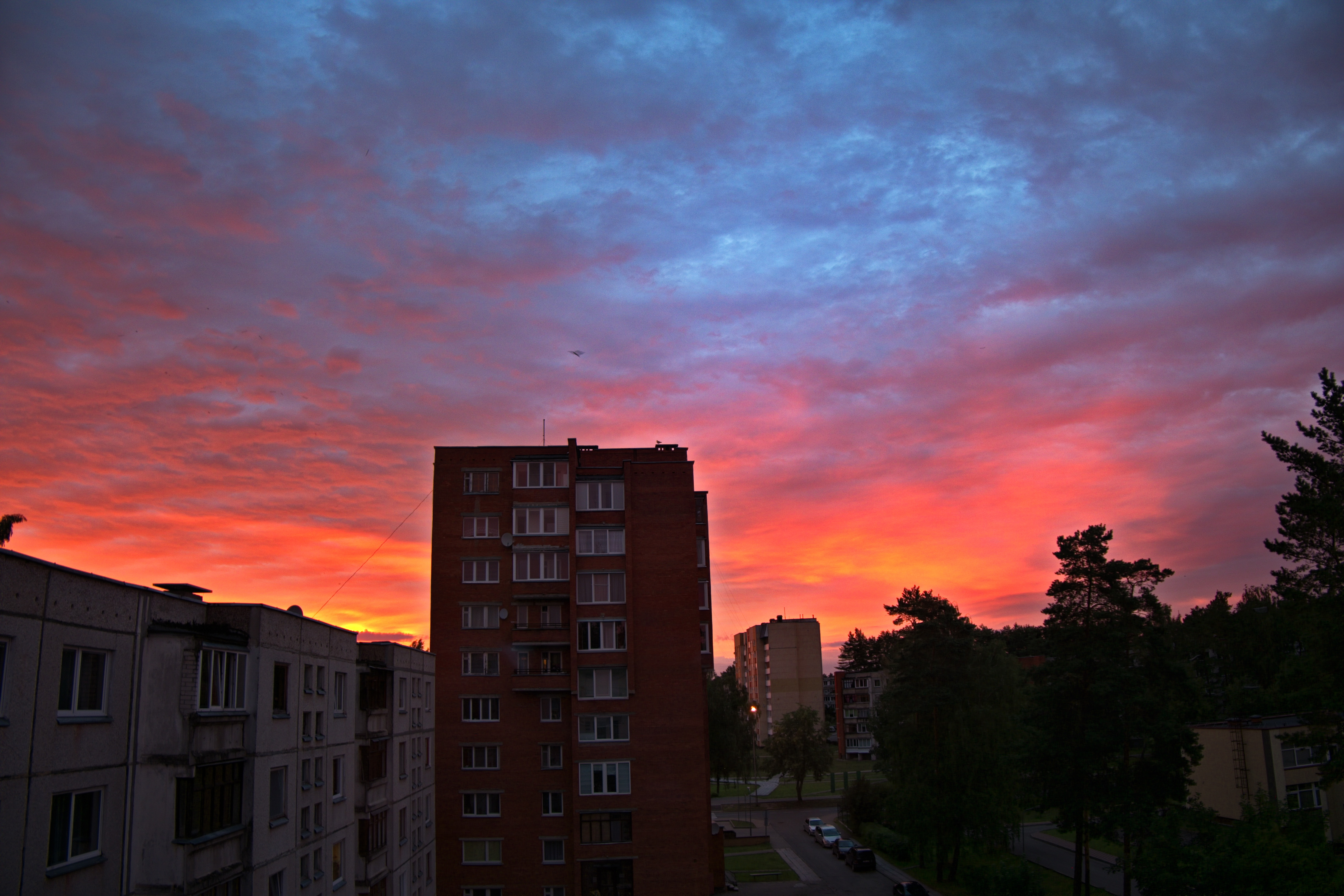 Город в Литве, вид с балкона.